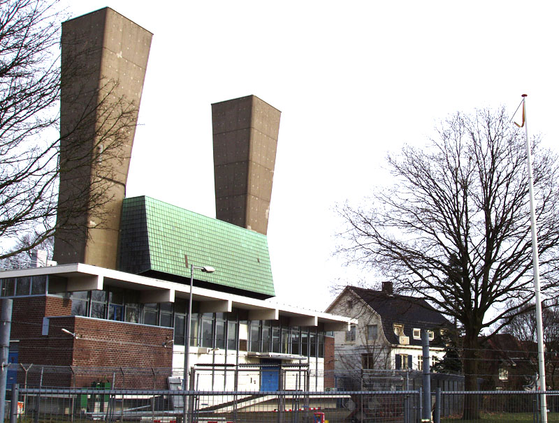 Noordelijk ventilatiegebouw van de IJtunnel aan de Meeuwenlaan in de Vogelbuurt in Amsterdam-Noord